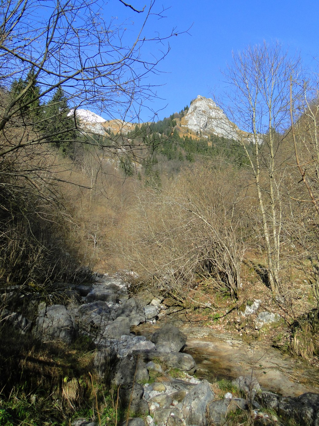 Vista della val Dossana. Prealpi Bergamasche (BG)